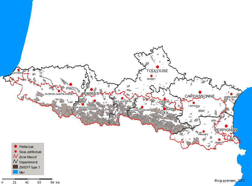 Carte de localisation des ZNIEFF de type 1 dans les Pyrénées